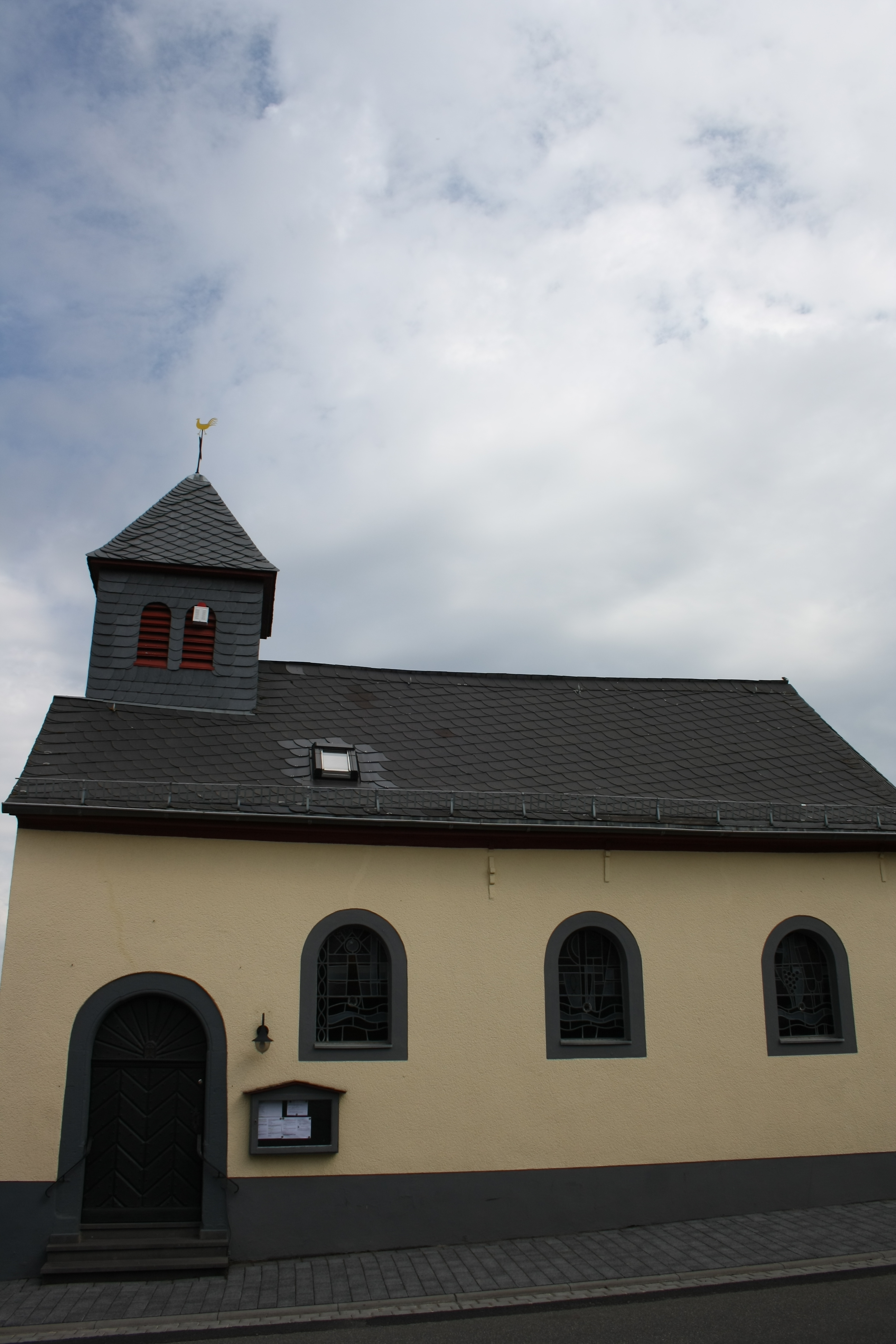 katholische Kapelle St. Geronis und Bartholomäus in Kalenborn